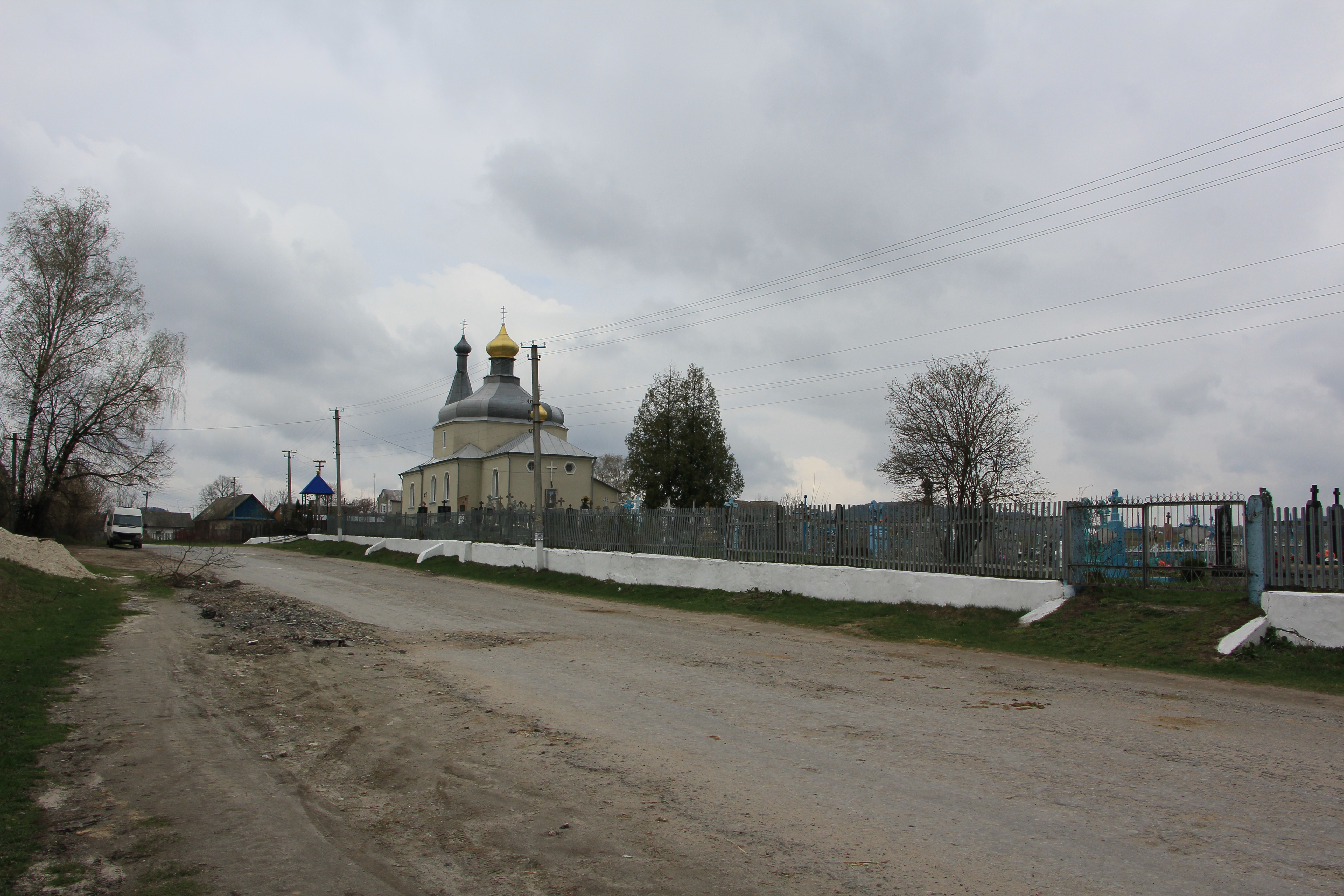 Мурована церква в селі Рудки Кременецького району Тернопільської області